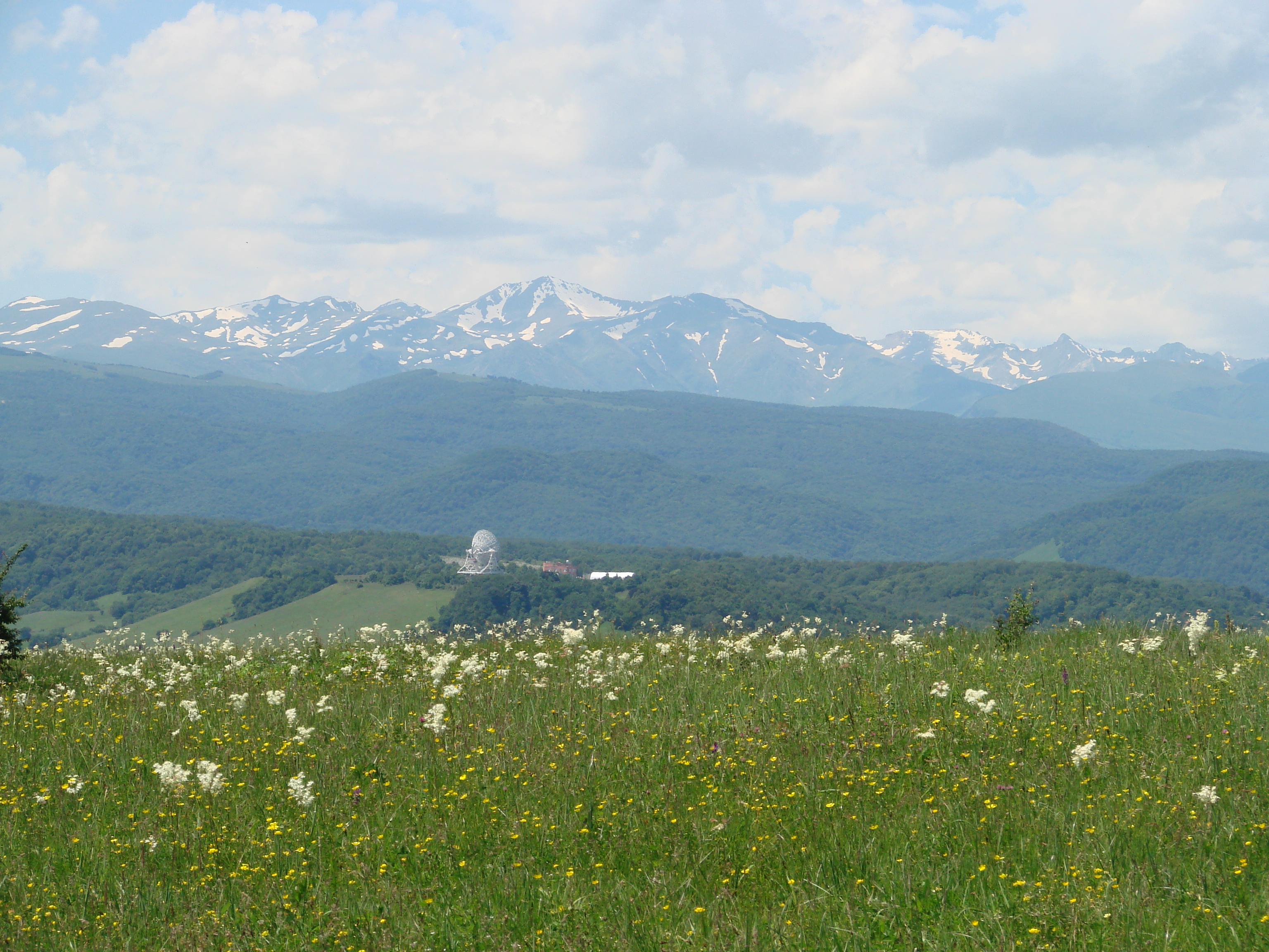 вид с окресностей